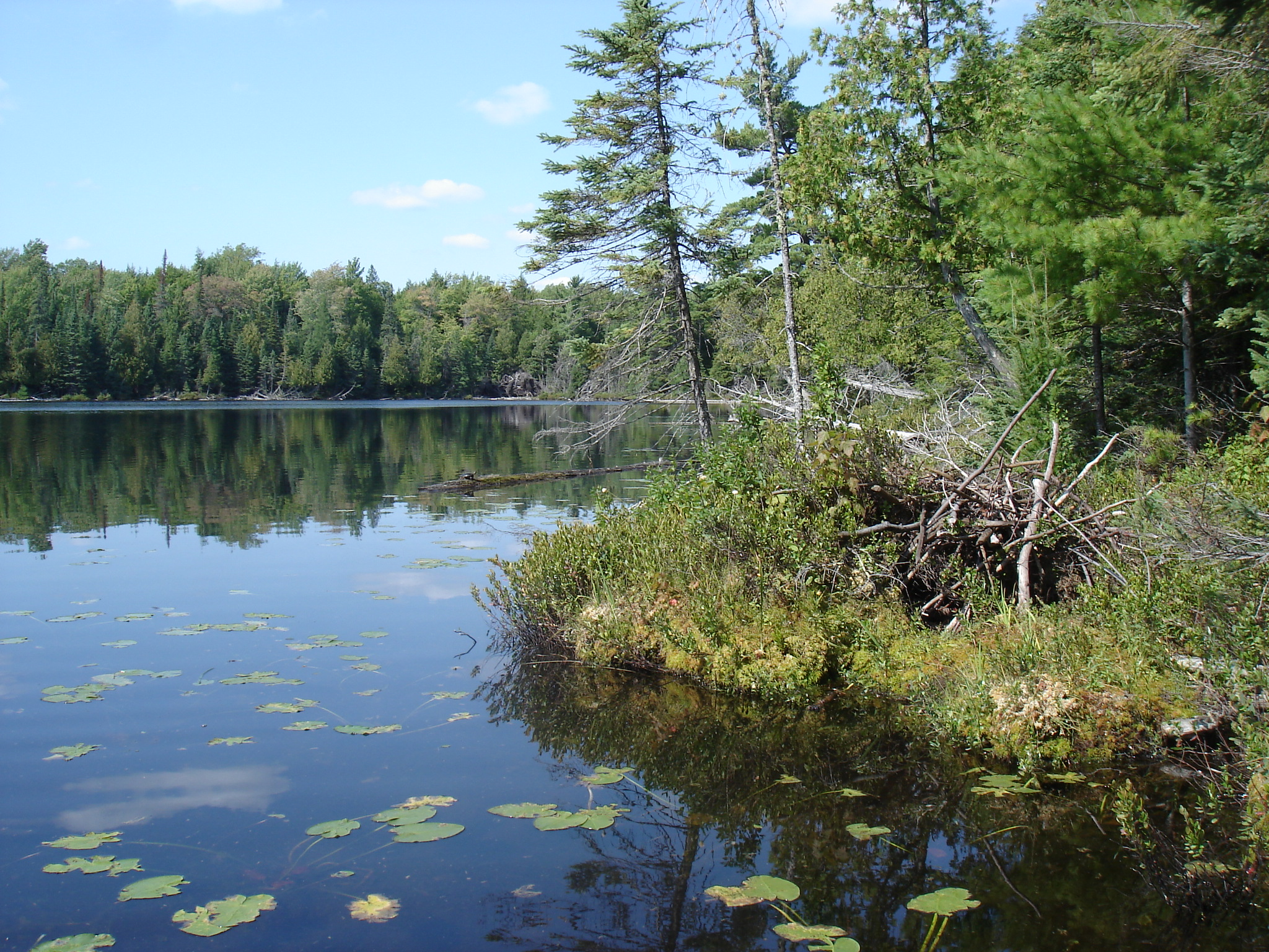 Hemlock Lake